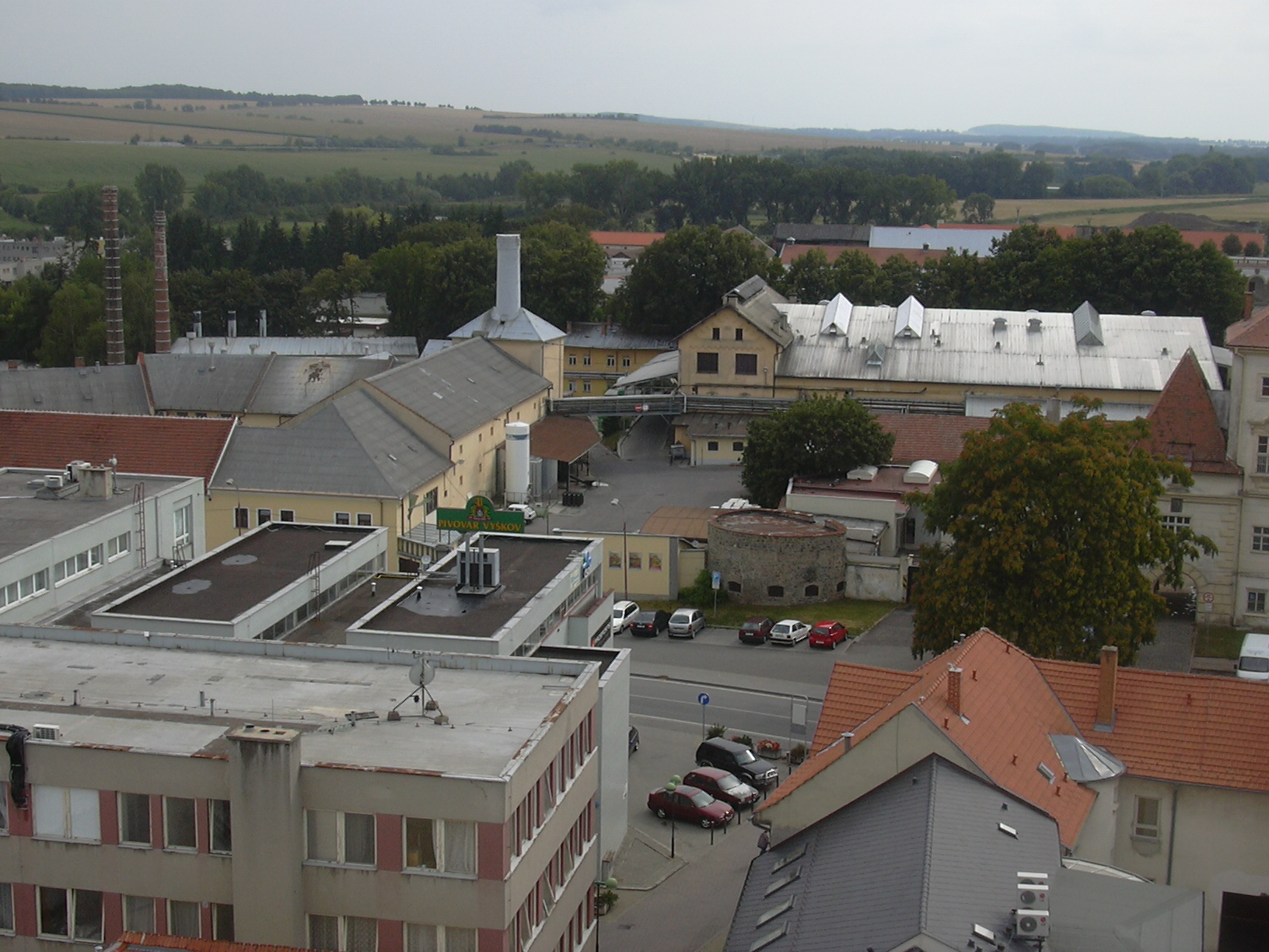 Pivovar Vyškov foceno z vyškovské radnice